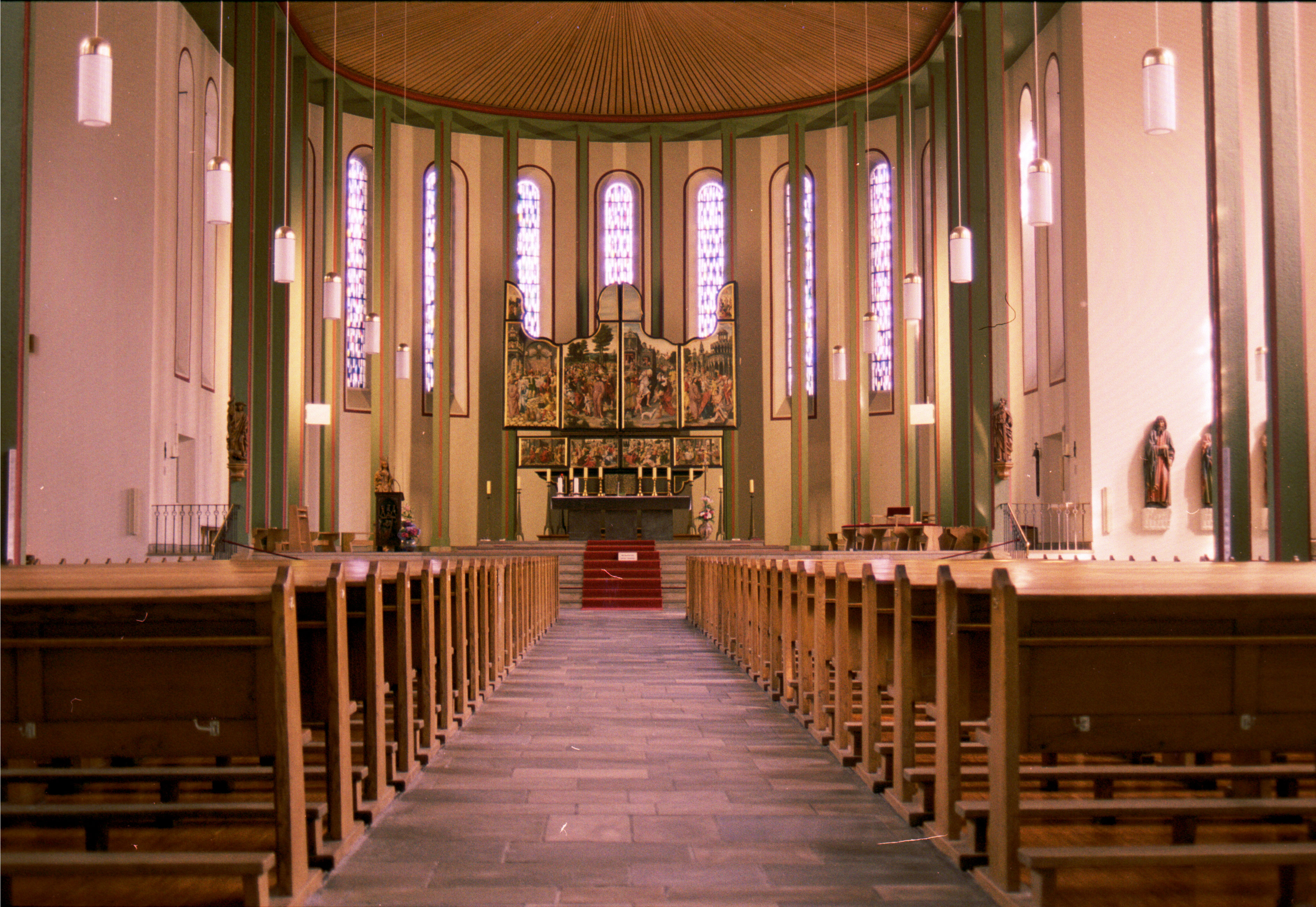 Interior of the church of St George in Vreden, Germany